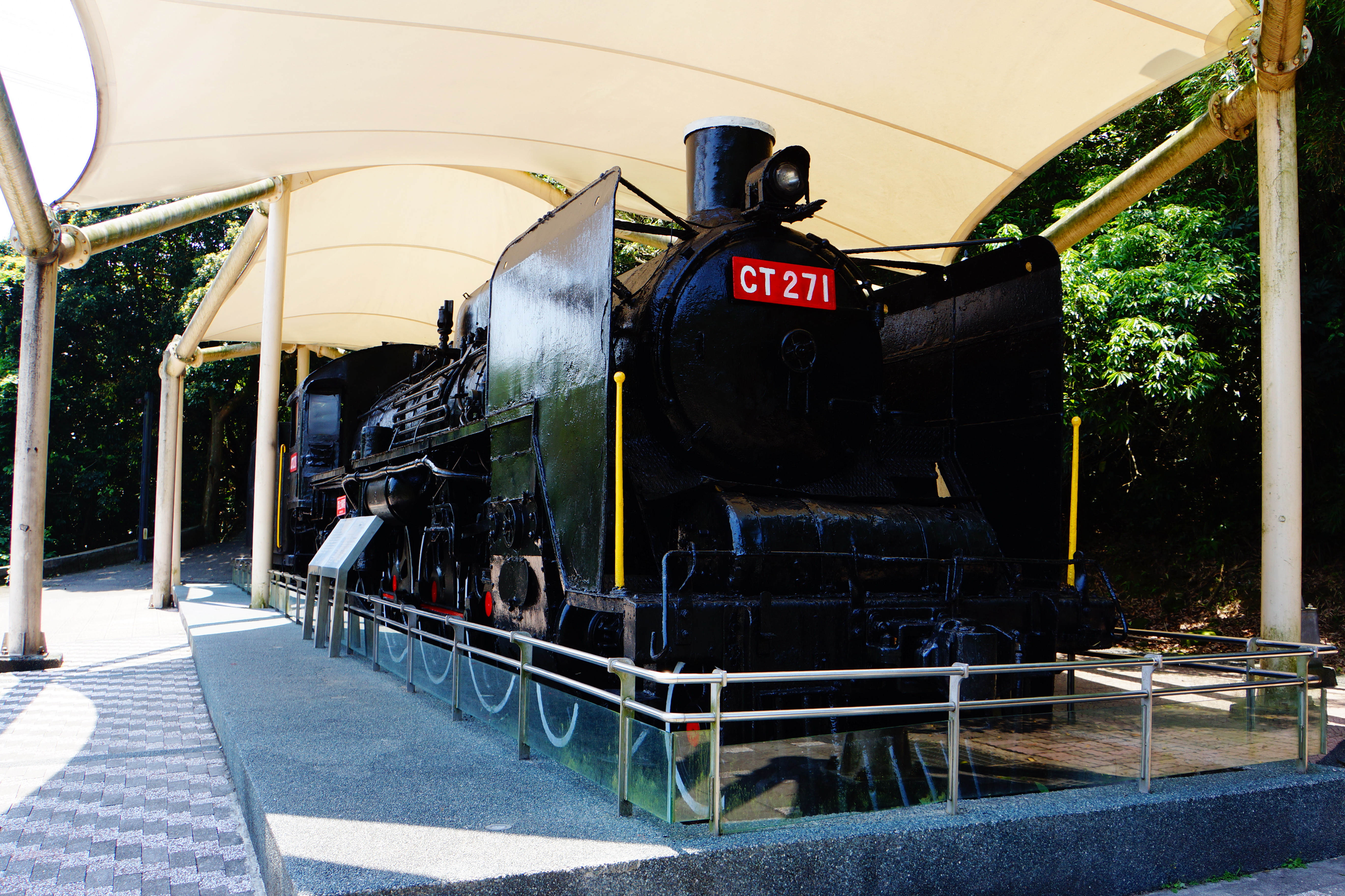 臺灣鐵路管理局蒸汽機車CT271於情人湖靜態展示。